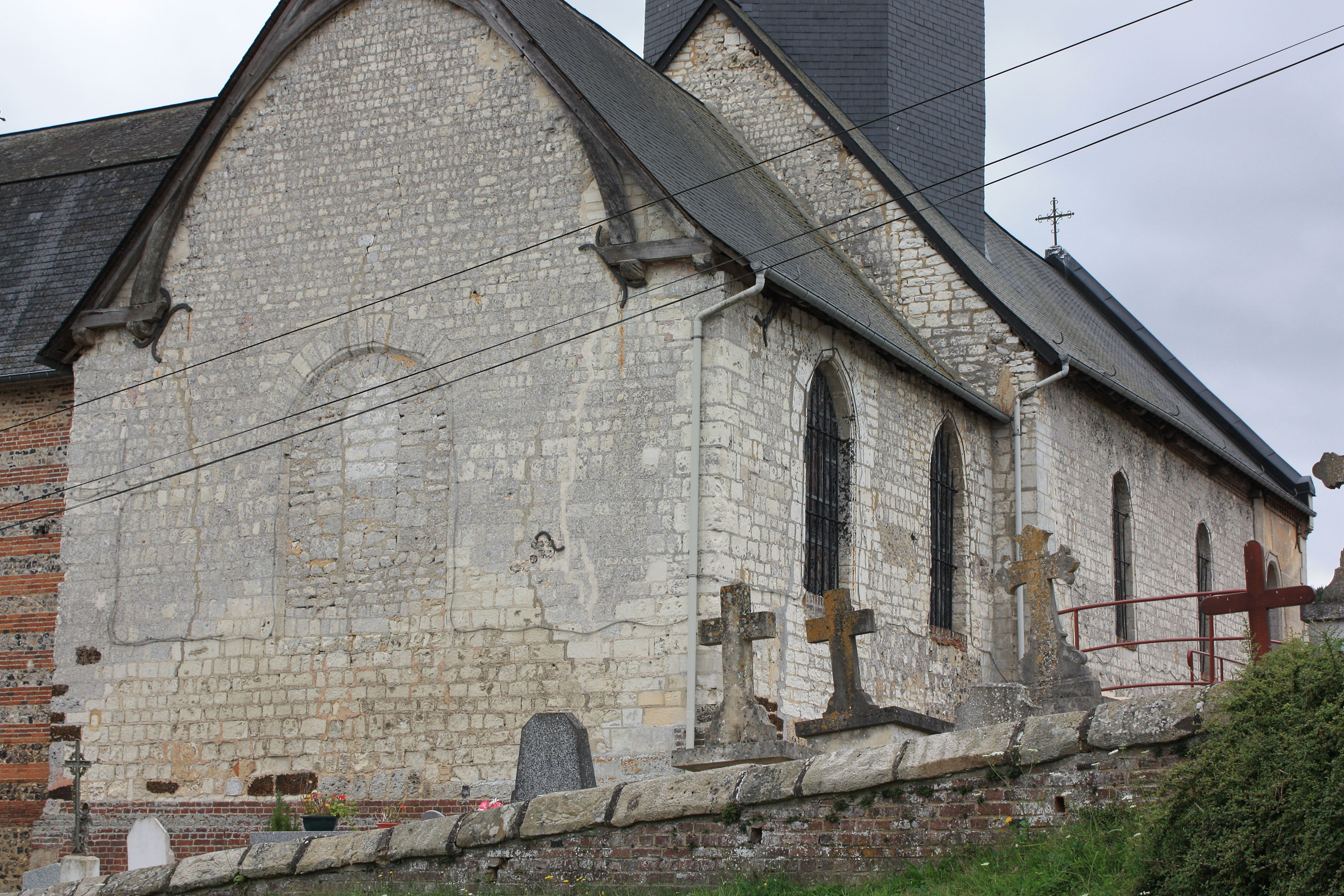 Massy - Eglise Saint-Pierre, vue générale